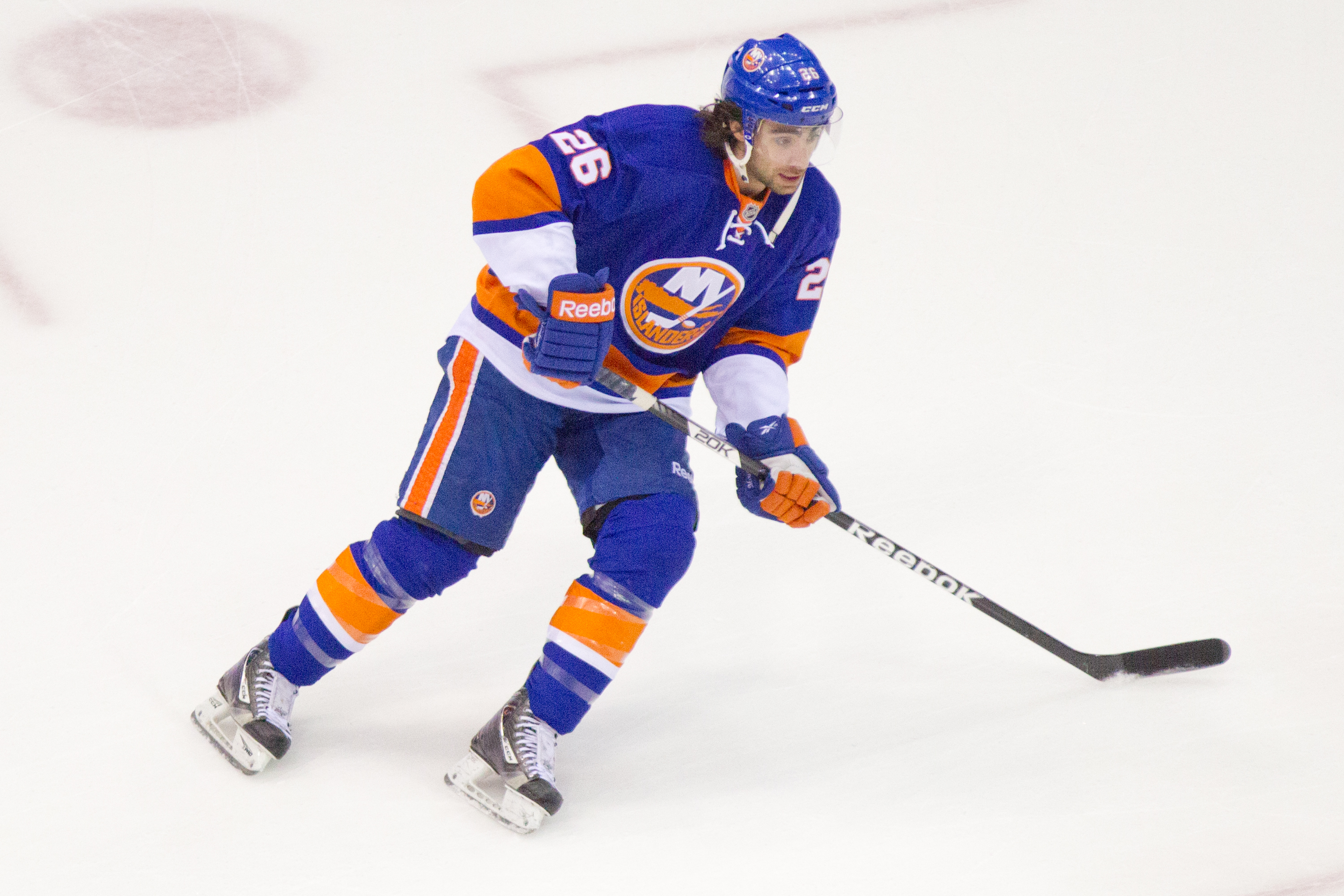 Matt Moulson vs Rangers